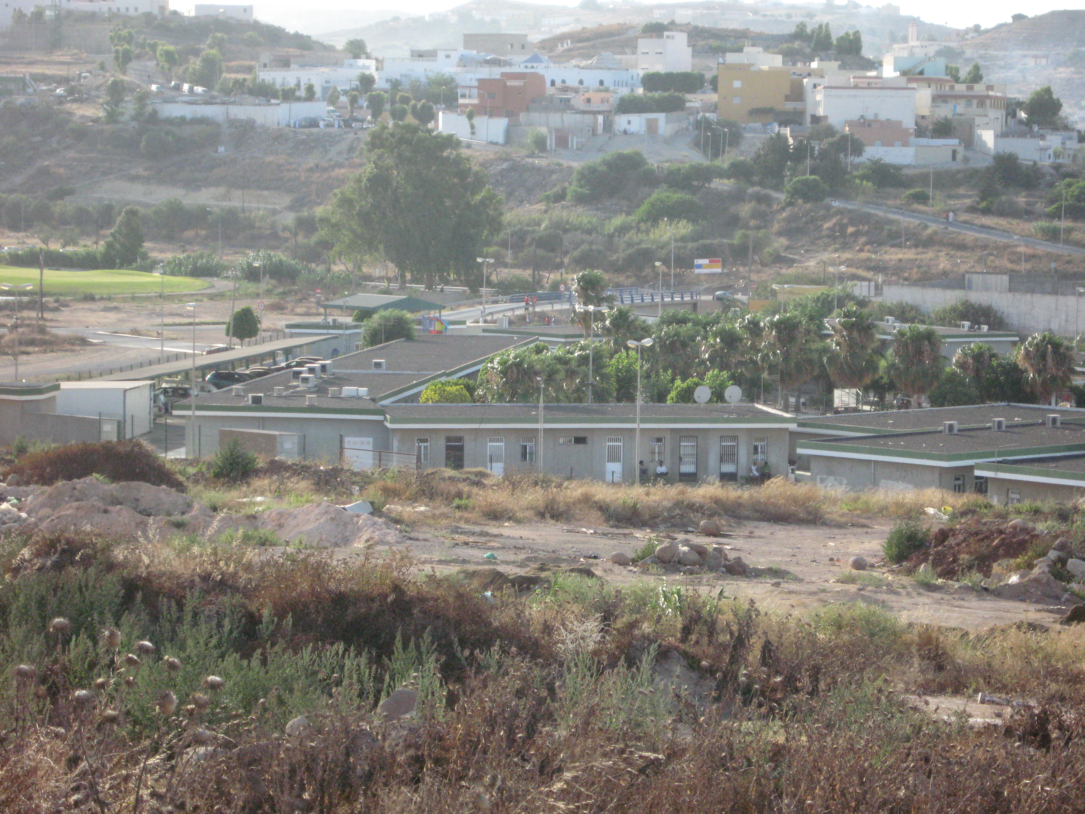 El Centro de Estancia Temporal de Inmigrantes (CETI) de Melilla fue construido en 2001